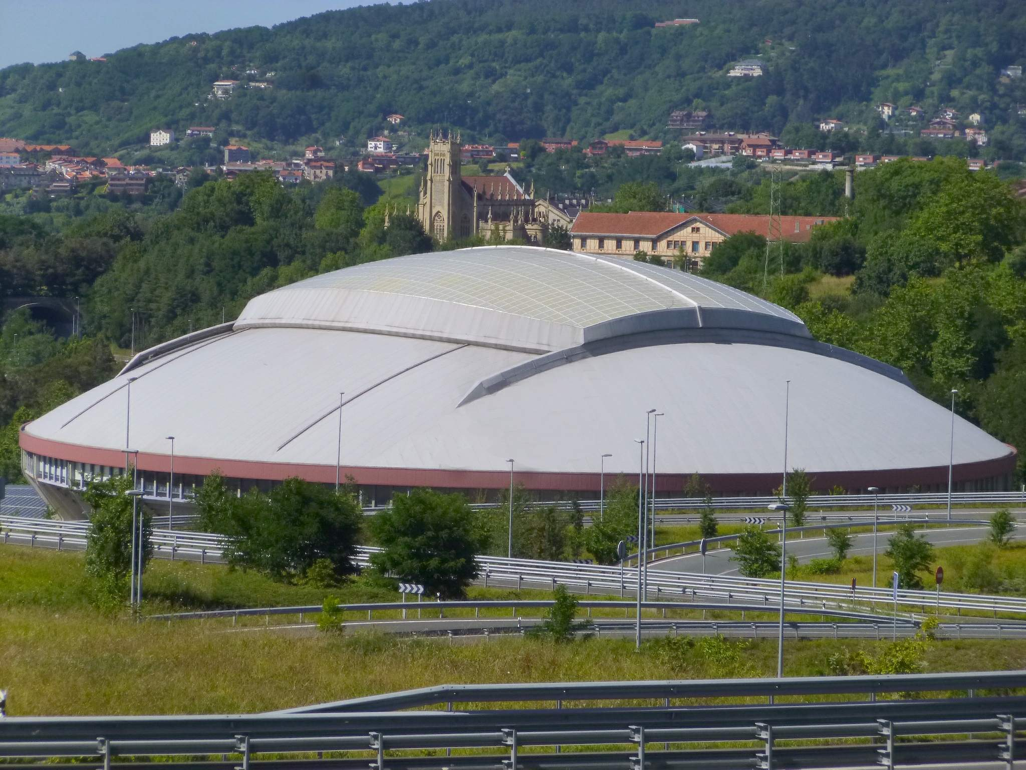 San Sebastián - Donostia Arena